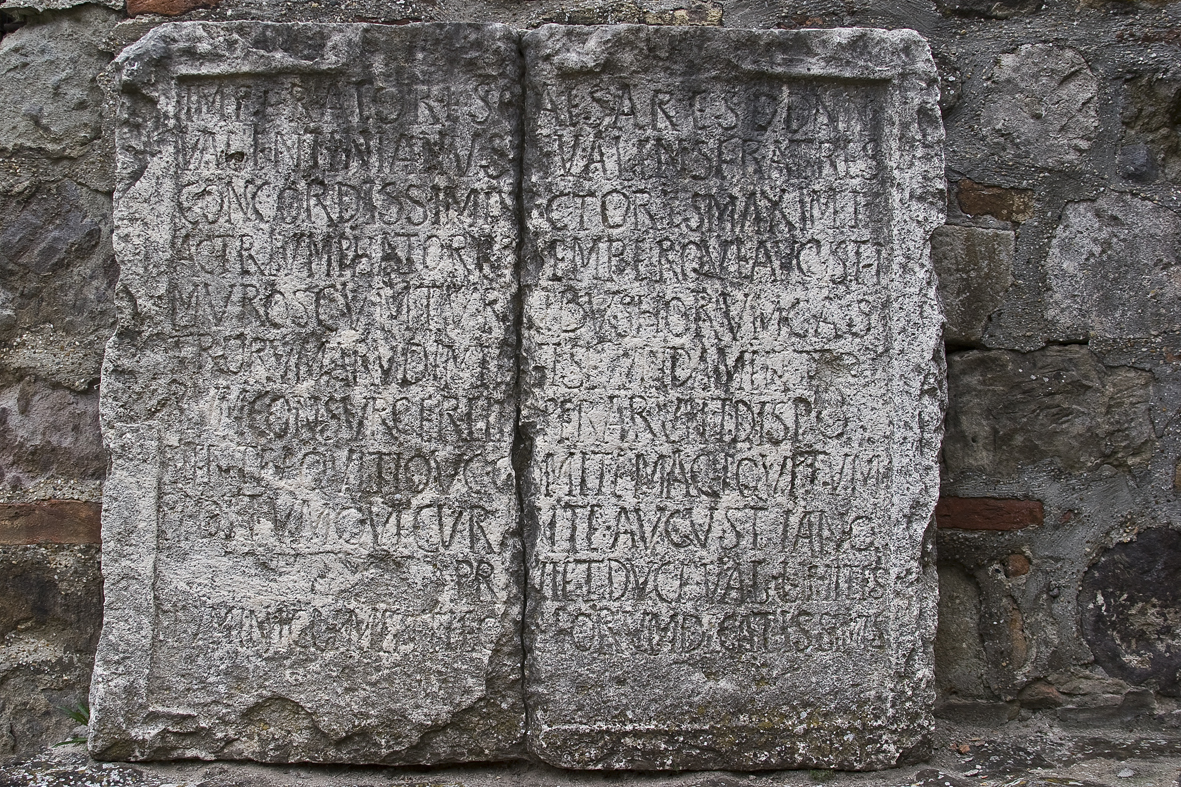 emléktábla